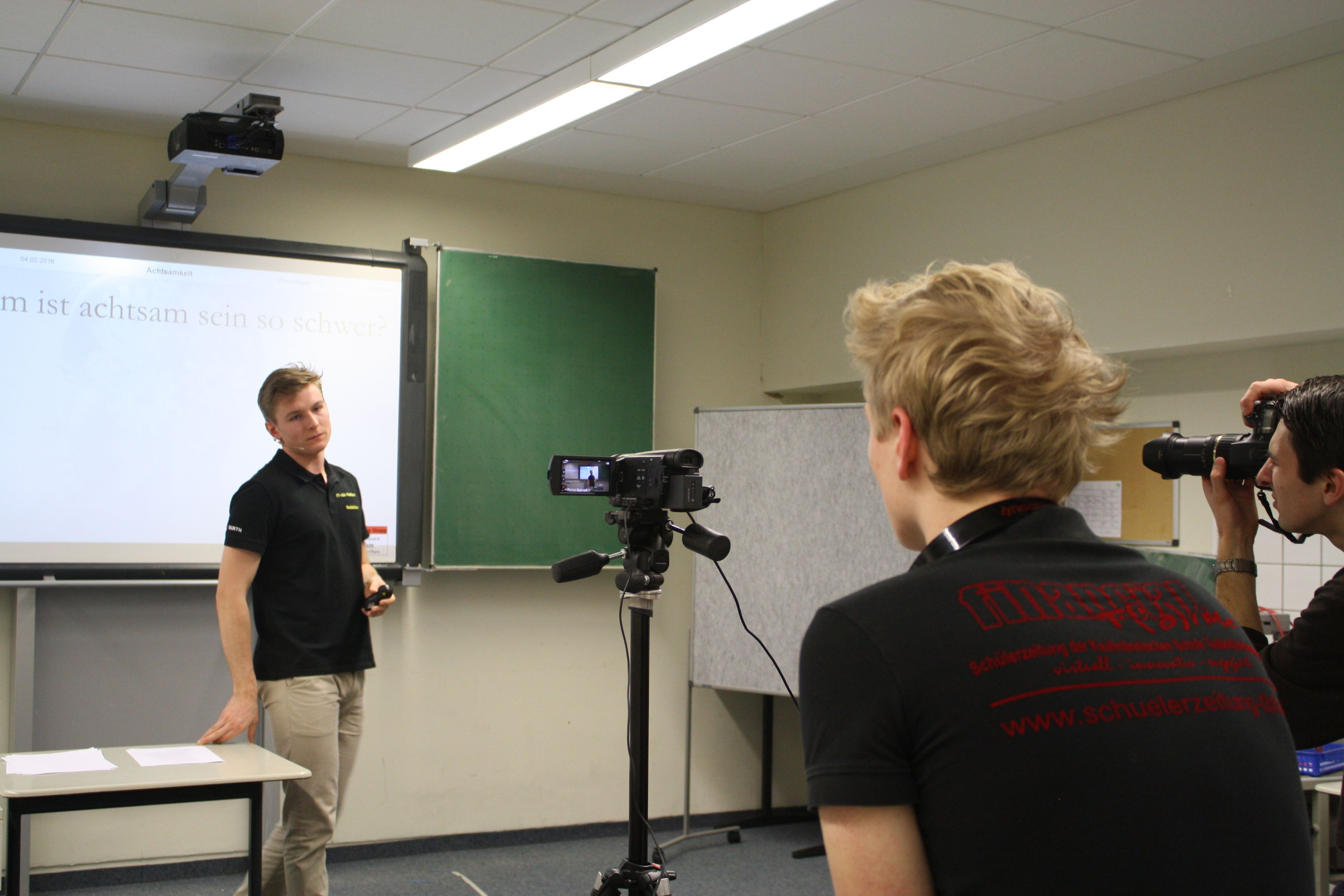 Financial T('a)ime (FT), Schülerzeitung der Kaufmännischen Schule Tauberbischofsheim.